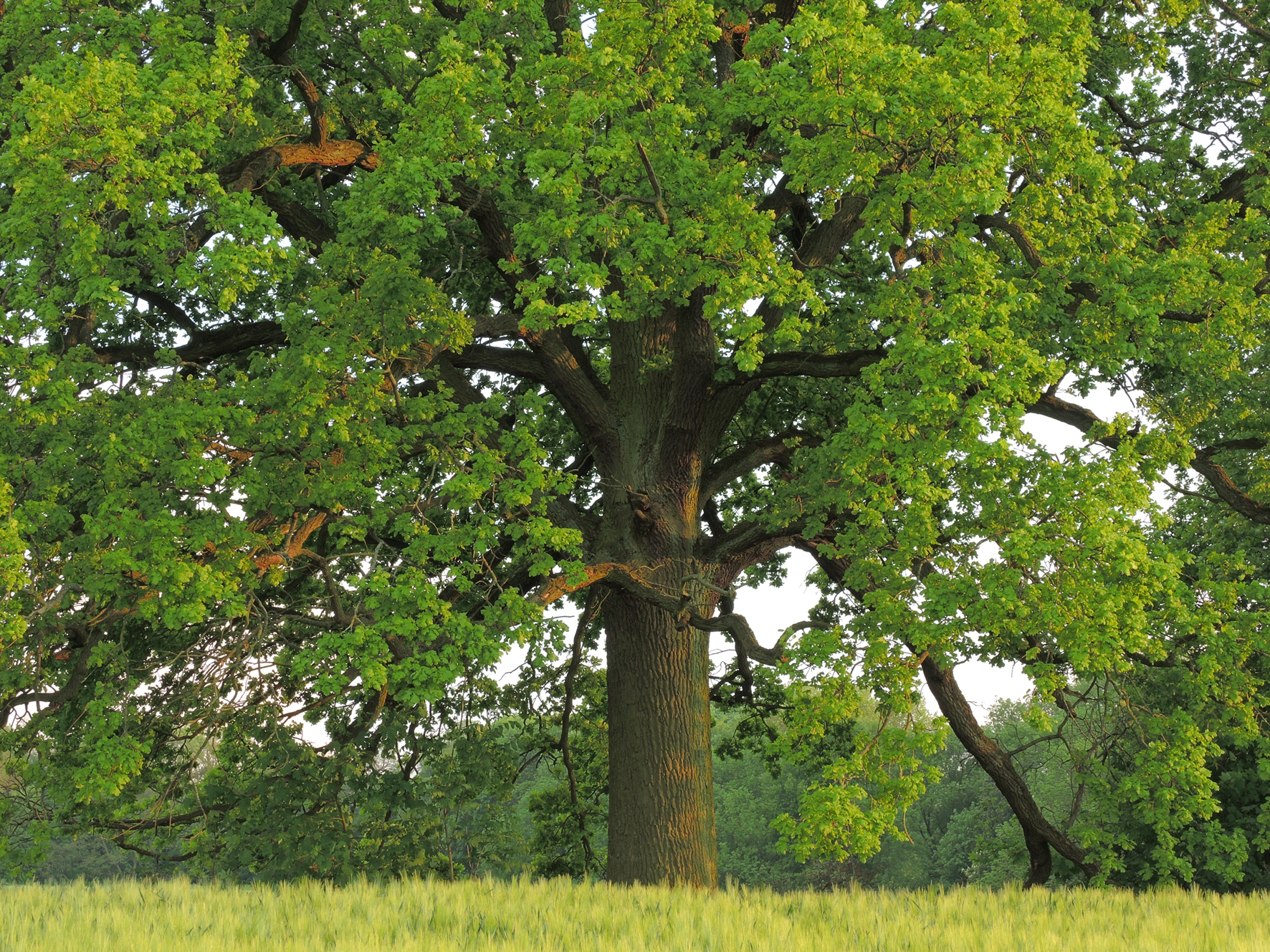 Naturdenkmal 092-03 pic30: Stiel-Eiche «Kaisereiche» in Hohenfinow (Barnim-Brandenburg-Deutschland) etwa 400 m nördlich des Parks auf dem sogenannten Kaiserland, freistehend am Wald-/Feld-Rand. Baum im Abendlicht, Querformat, Formatfüllend. Fotografin kann auf Anfrage Bild in höherer Auflösung bereitstellen.